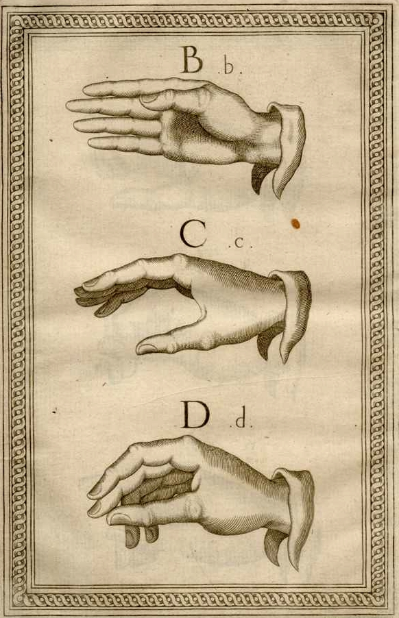 «Abecedario demonstrativo» de Reducción de las letras y arte para enseñar a hablar los mudos, Biblioteca Nacional de España, de Juan Pablo Bonet. 8 Láminas con grabados calcográficos insertos entre las páginas 130 y 131.